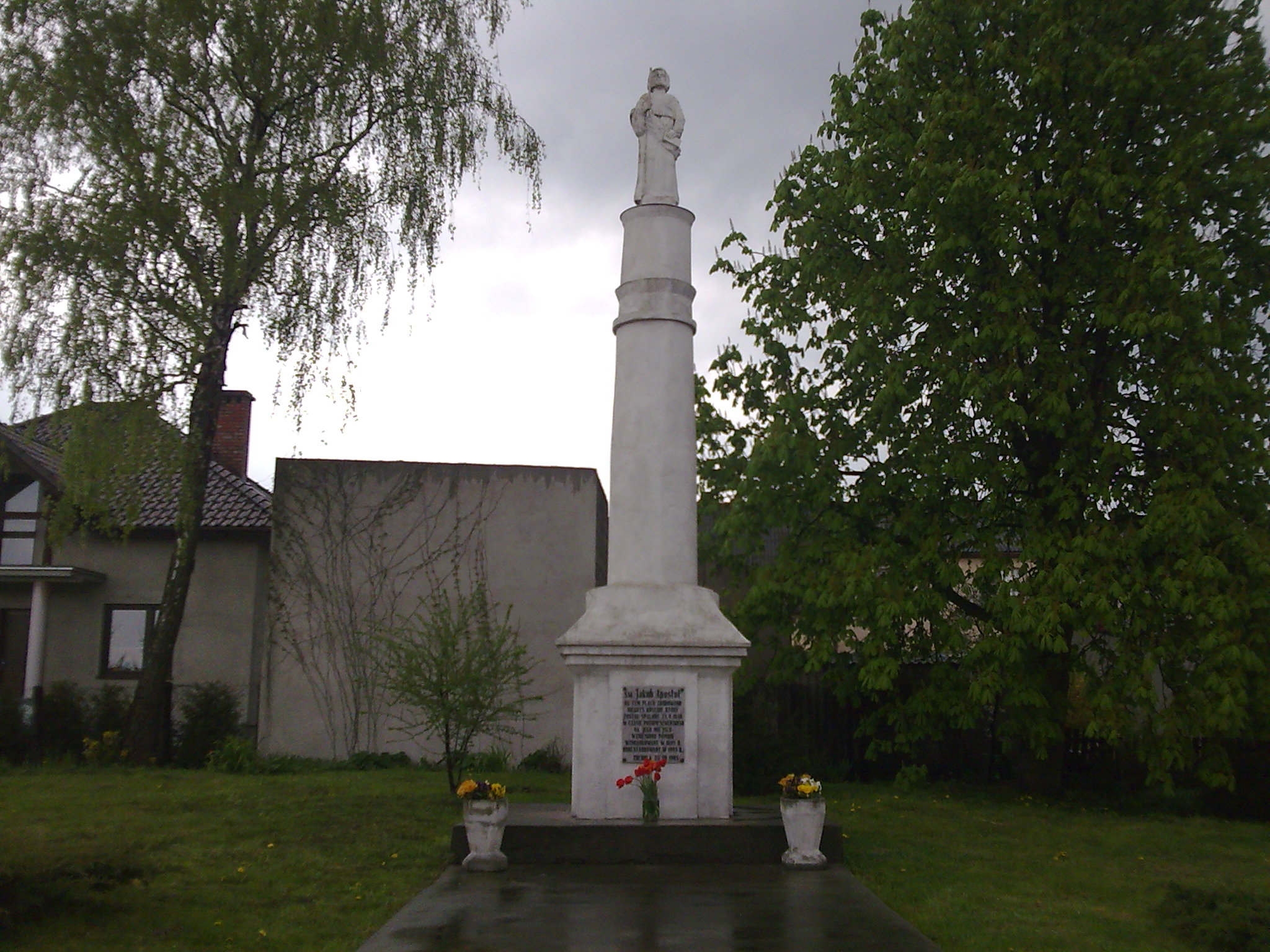 Tuchola, Święty Jakub